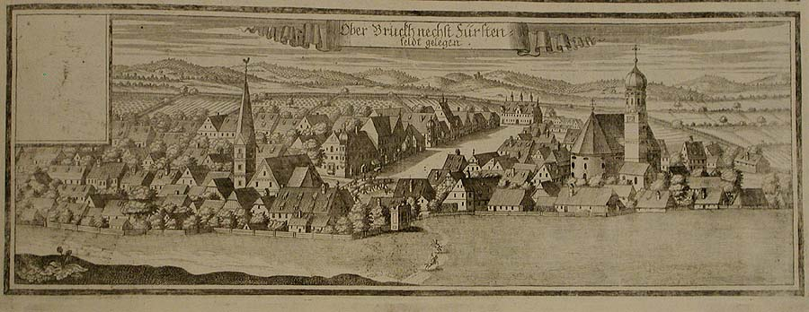 Ober Bruckh nechst Fürstenfeldt gelegen (Fürstenfeldbruck), alter Stich